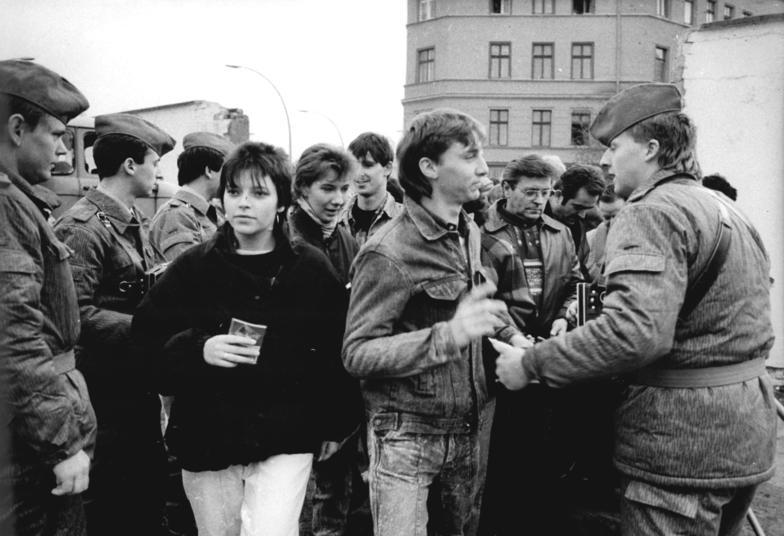 ADN-Zb-Settnik-11.11.89-Berlin: Grenztruppen der DDR errichteten in Höhe der Oderberger -Schwedter Straße den neuen Übergang Eberswalder Straße. Rechtzeitig waren auch die Mitarbeiter der Abfertigungsorgane zur Stelle. Kurz vor acht Uhr setzte sich die Menschenmenge, die sich auf dem Vorplatz versammelt hatte, zum Besuch von Berlin (West) in Bewegung.